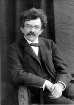 Max Hermann, ca. 1900